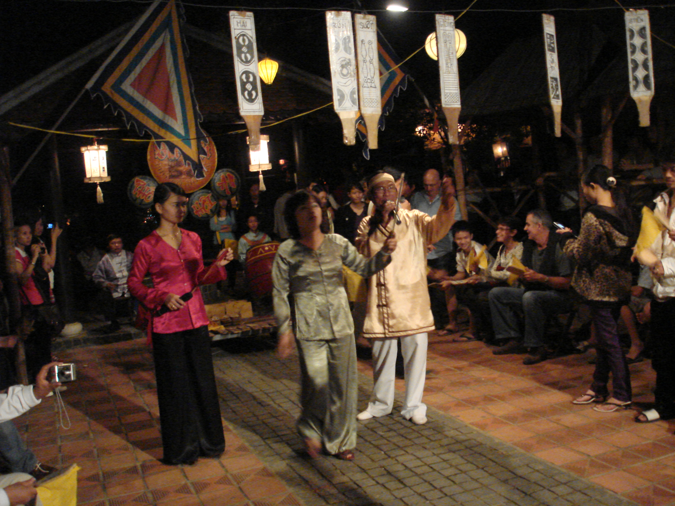 Hát bài chòi 1